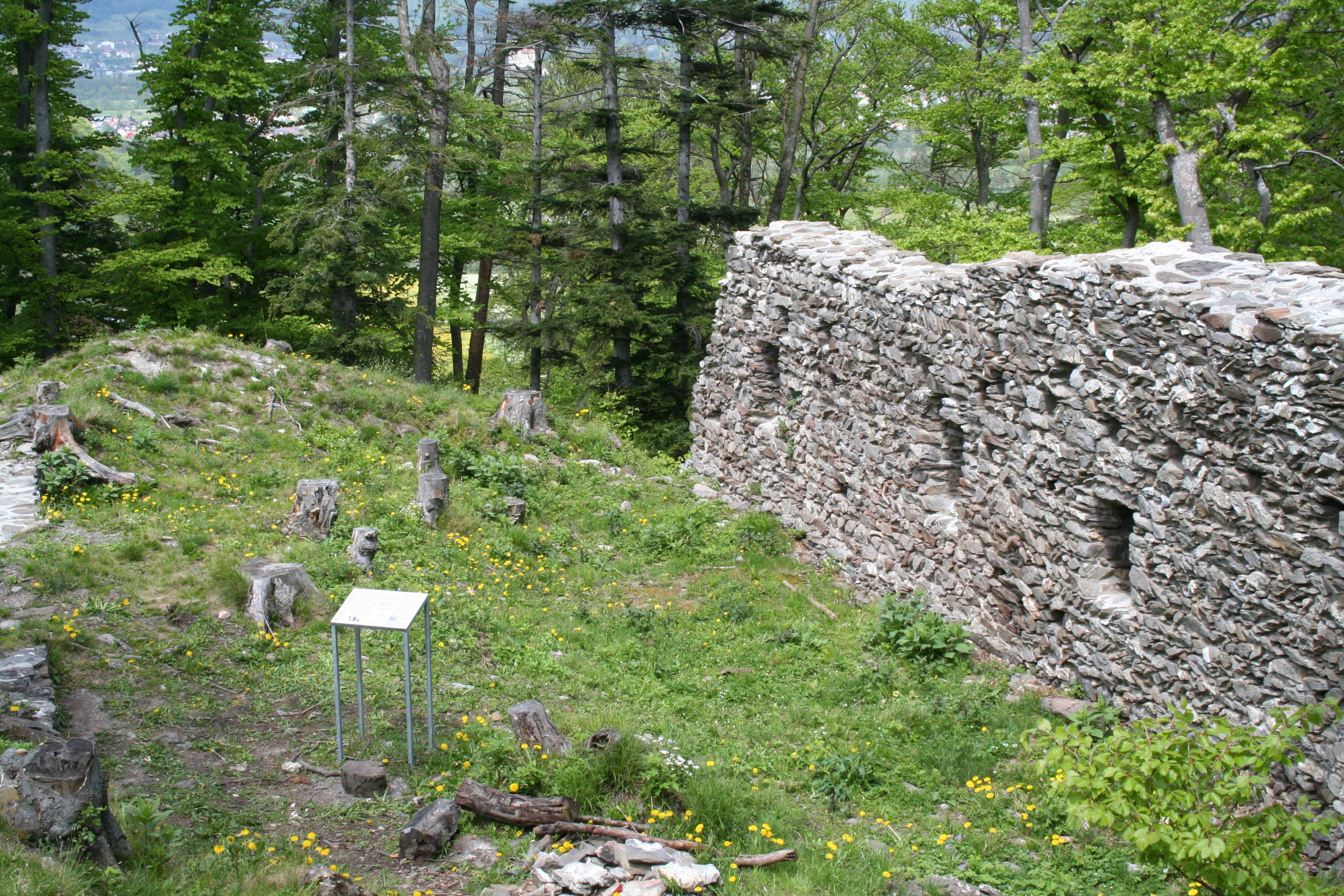 Burghügel; Blick nach Norden